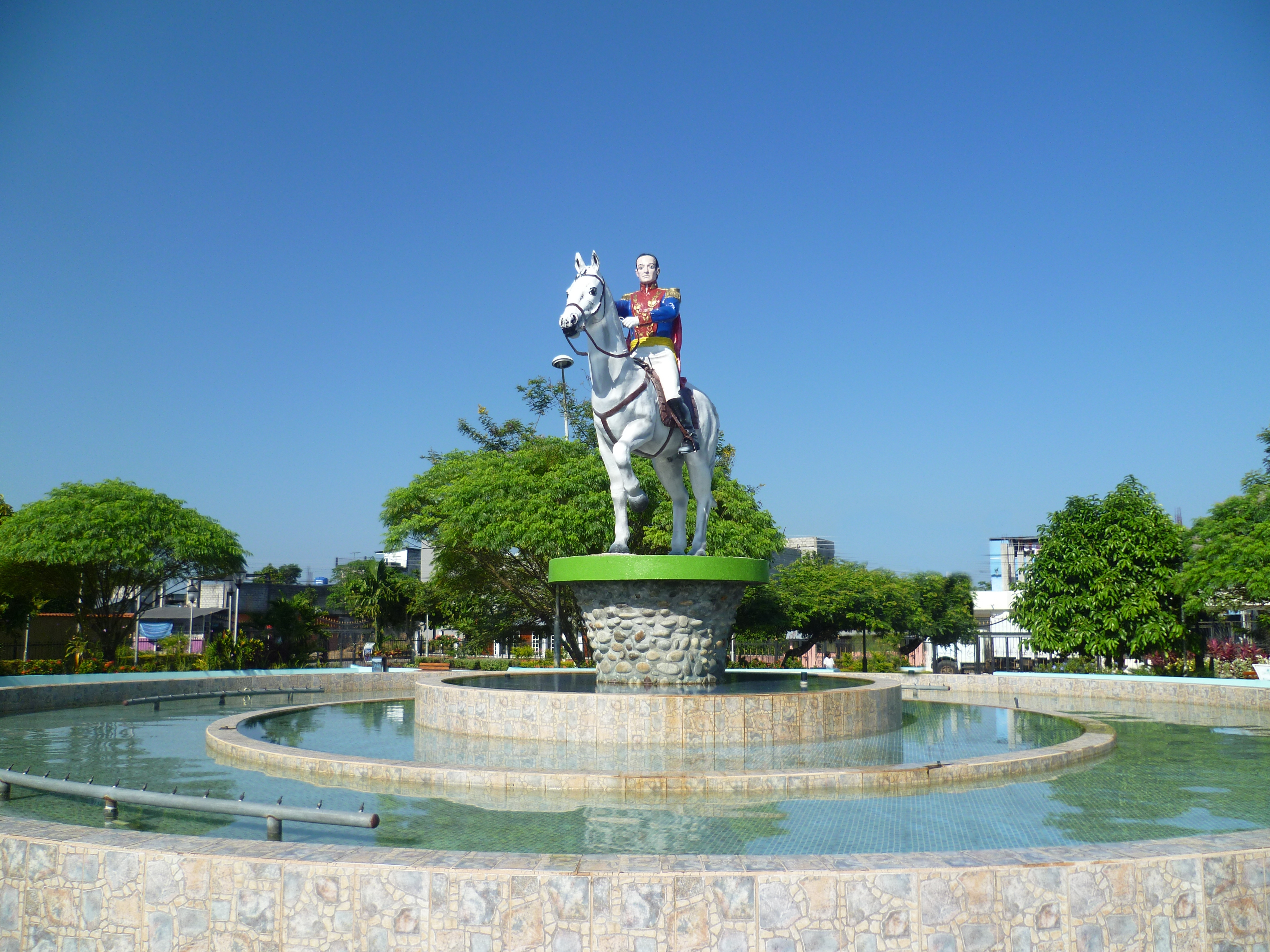 Monumento Parque Simón Bolívar en Lago Agrio